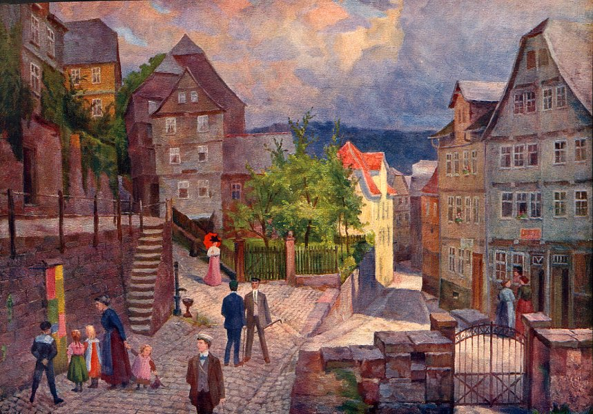 Marburger Verbindungsstudenten. Motiv aus der 1911 in der N. G. Elwert'schen Verlagsbuchhandlung, Marburg, erschienen Sammelmappe "Alt=Marburg" des realistisch-romantischen Landschaftsmalers Karl (Carl) Armbrust: Kugelgasse (Blick nach Osten).